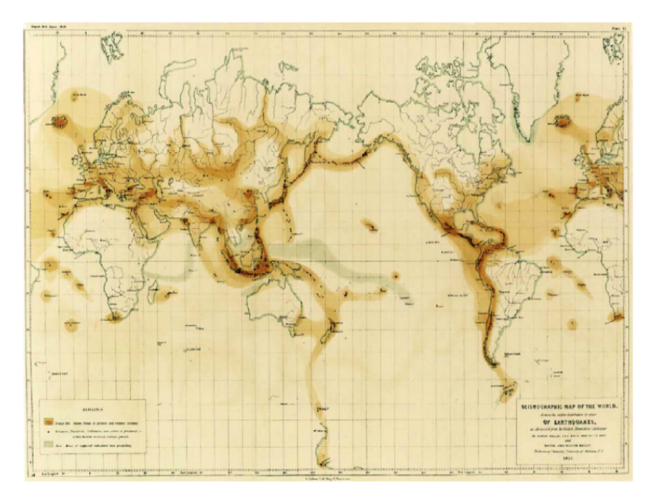 Carte de sismicité mondiale établie par le géologue Robert Mallet (Trans. BriXsh Assoc. for the Adv. Of Science, Londres, 1858)